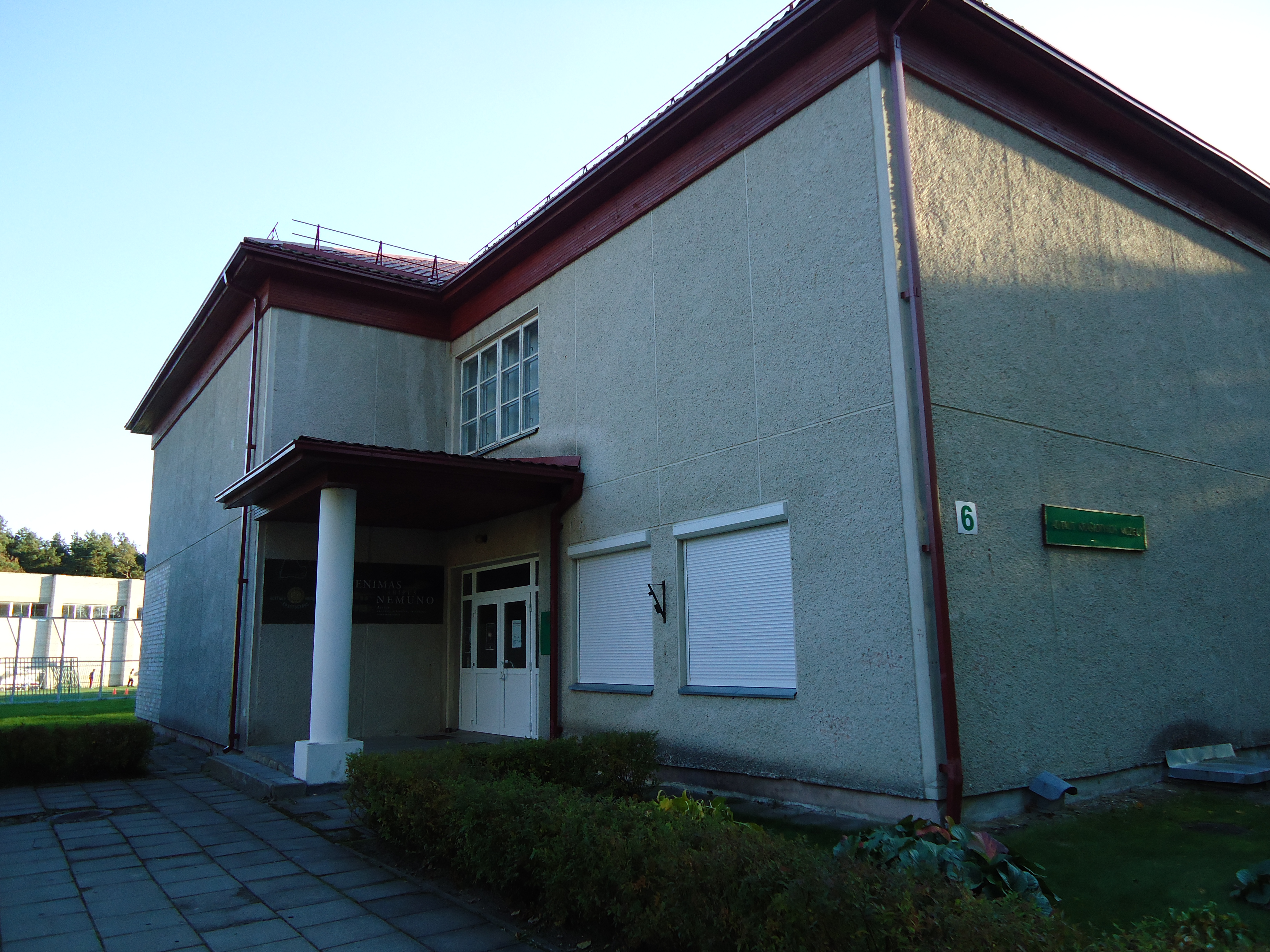 Alytaus kraštotyros muziejus